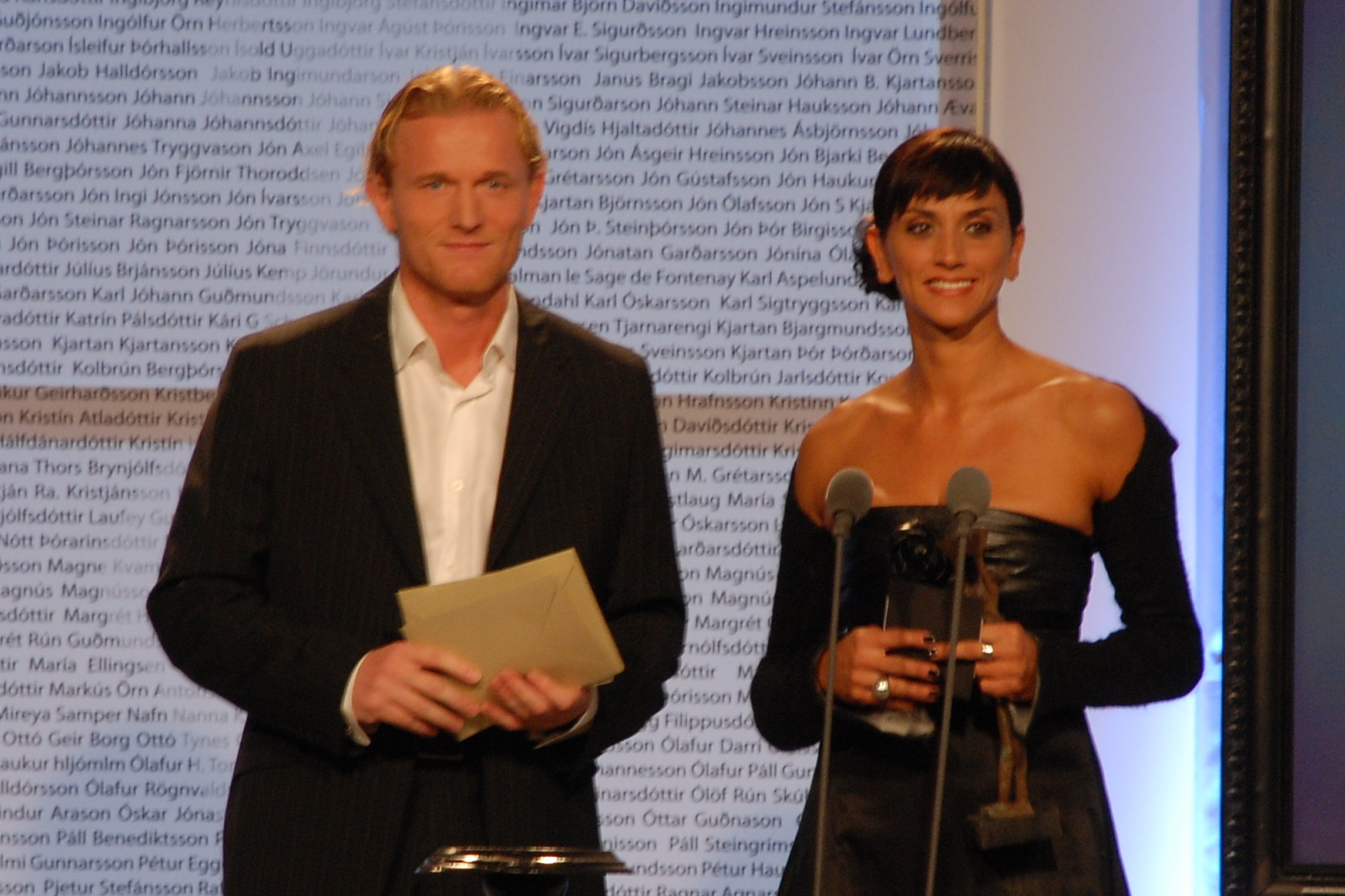 Þorfinnur Ómarsson og Nadia Banine á Edduverðlaununum árið 2007